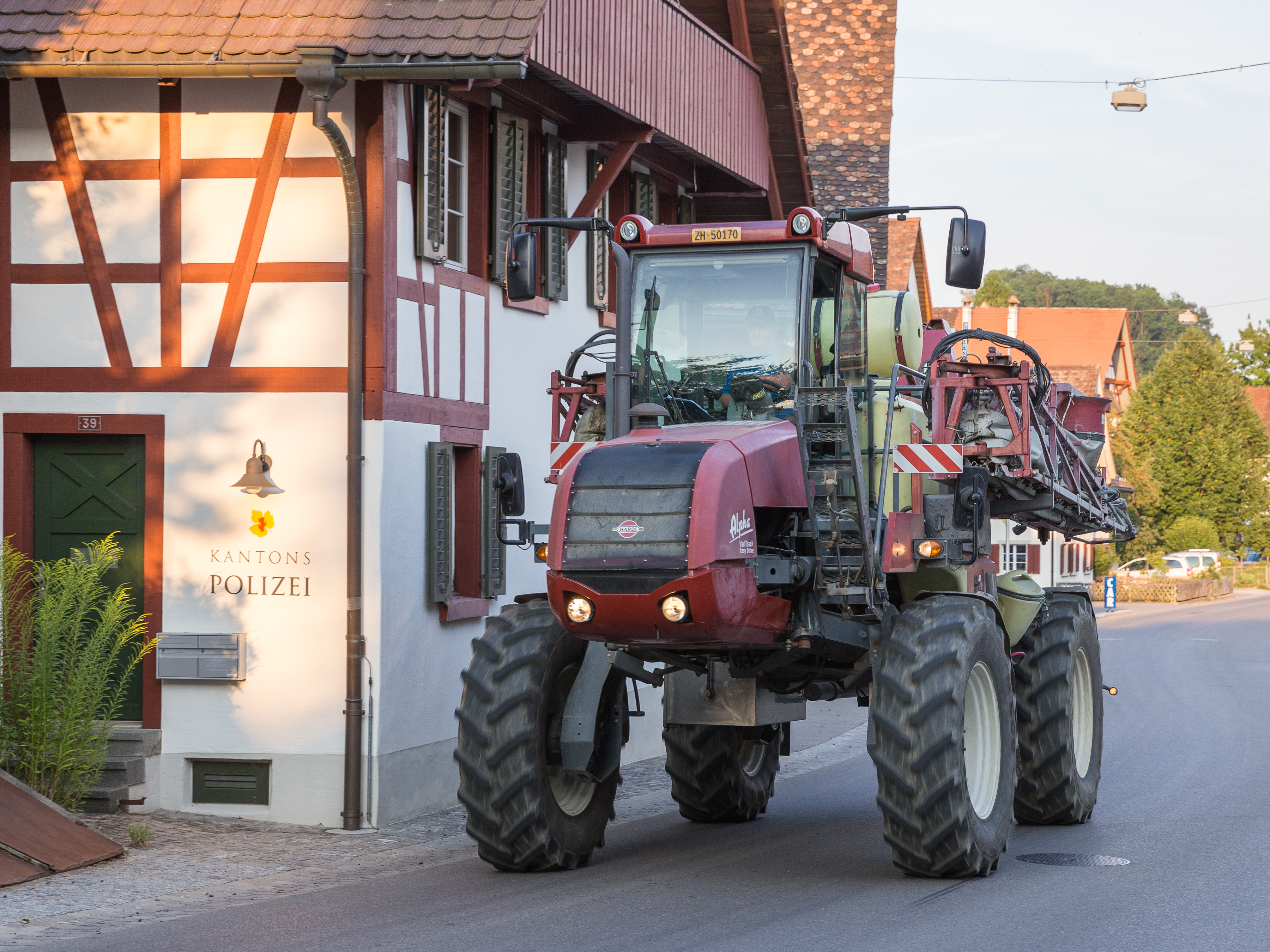 Viel Bodenfreiheit: Hardi VariTrack Selbstfahrspritze